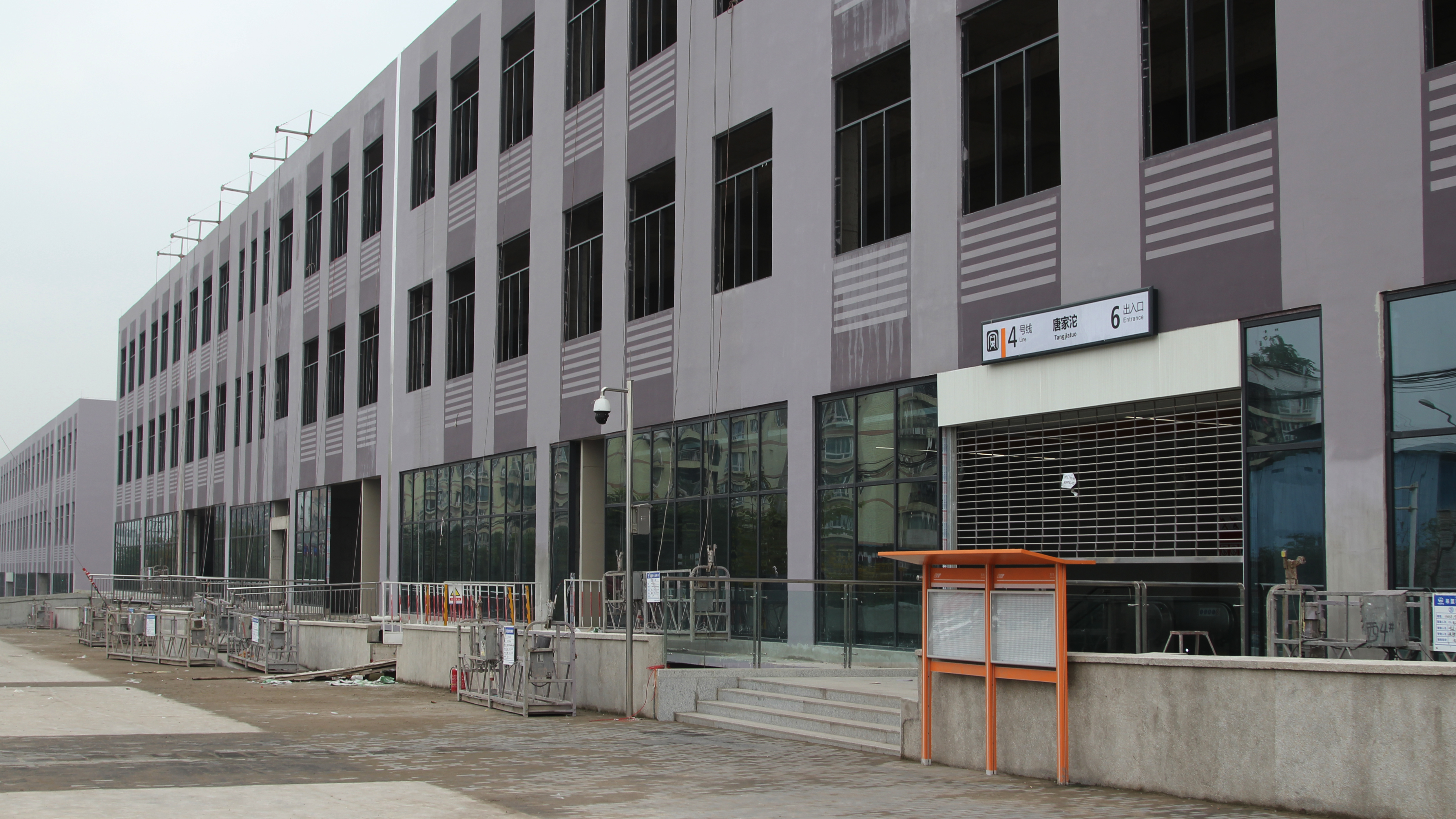 4号线唐家沱站6出口